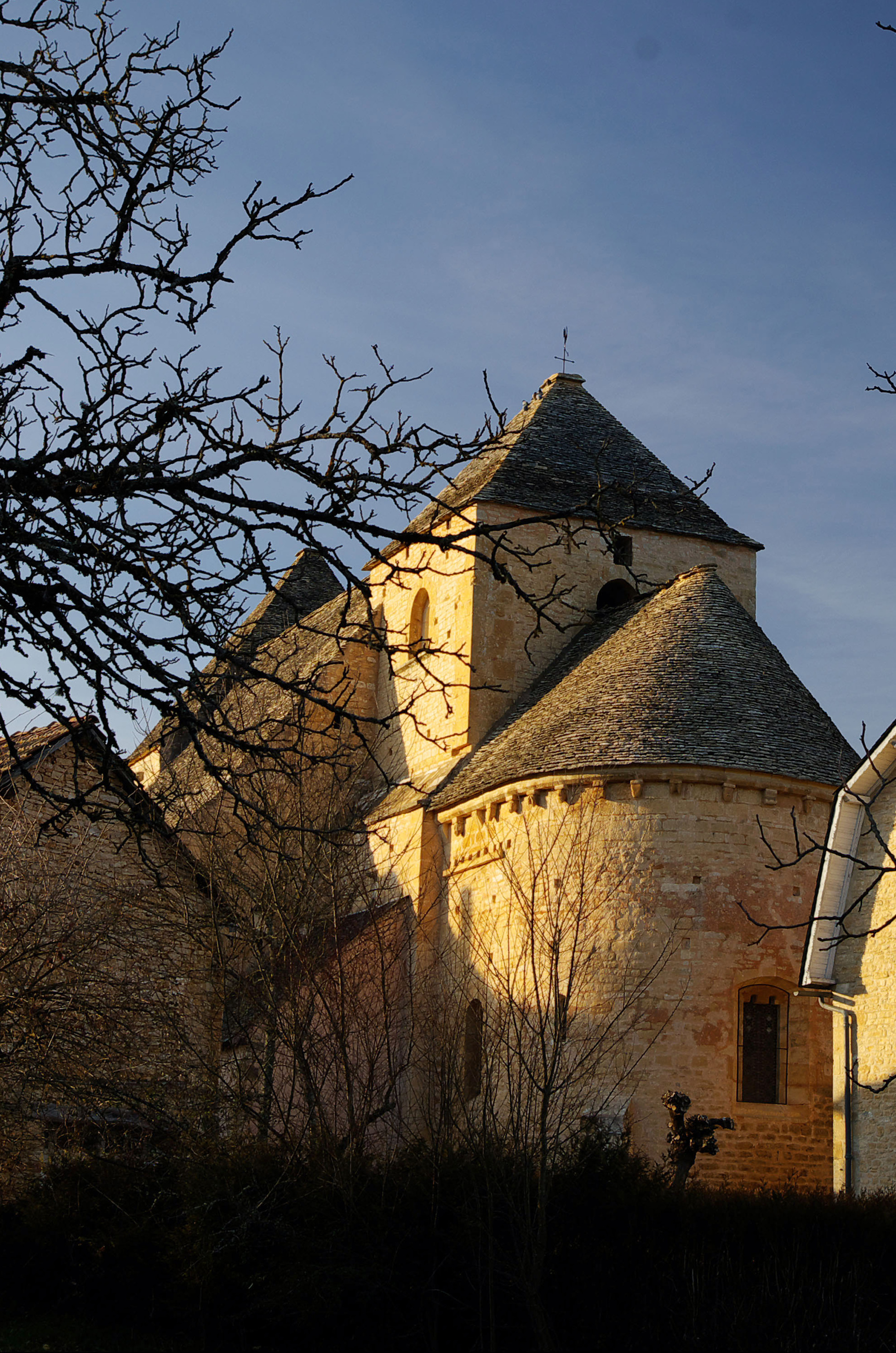 Église Saint-Étienne